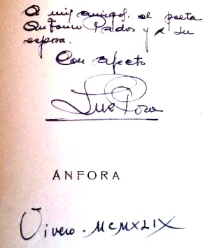 Dedicatoria de Luz Pozo Garza nun exemplar de Ánfora (1949)